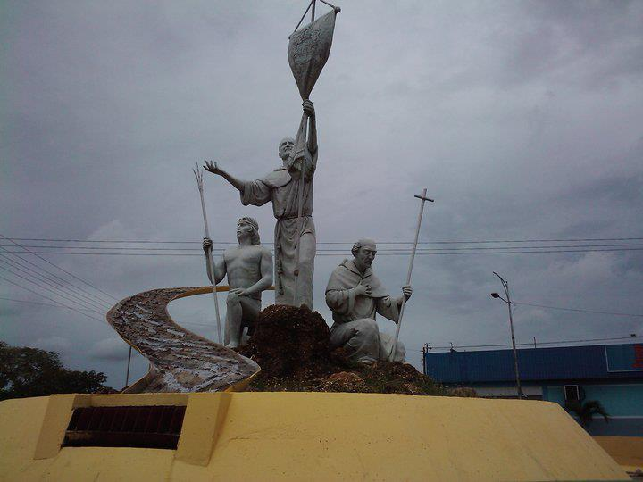 Monumento a los fundadores de Calabozo